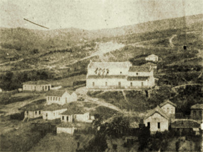 Vista do centro de Dores de Campos no século XIX